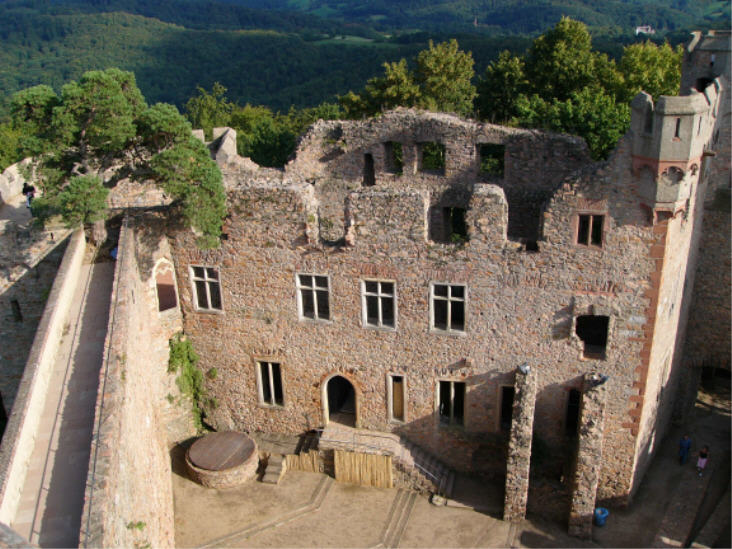 Das Foto zeigt den Palas und den Brunnen des Schlosses Auerbach im Odenwald bei Bensheim Copyright Status: GNU Freie Dokumentationslizenz